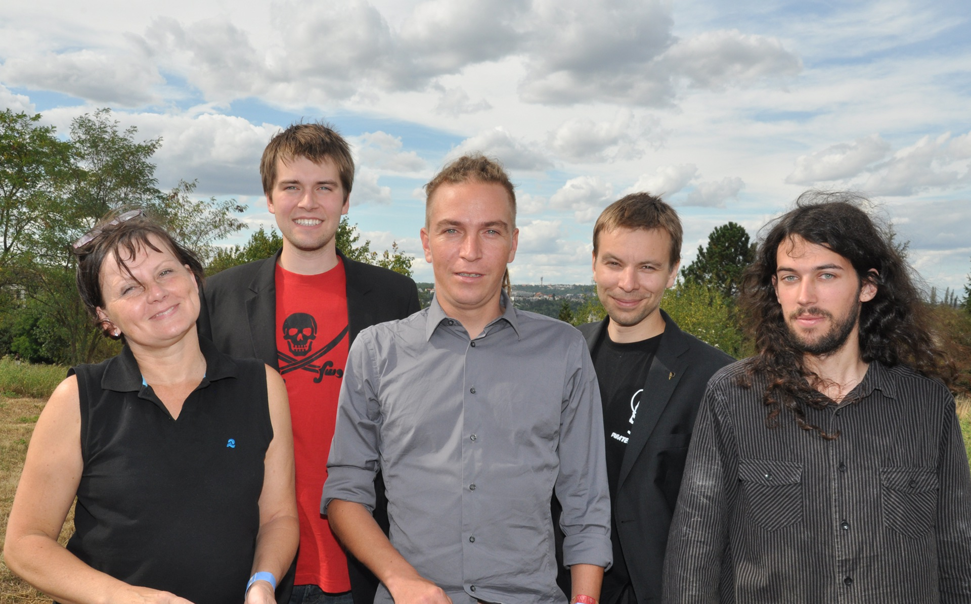 Předsednictvo České pirátské strany zvolené v srpnu 2012. Zleva: Lenka Matoušková, Jakub Michálek, Ivan Bartoš, Marcel Kolaja, Mikuláš Ferjenčík.